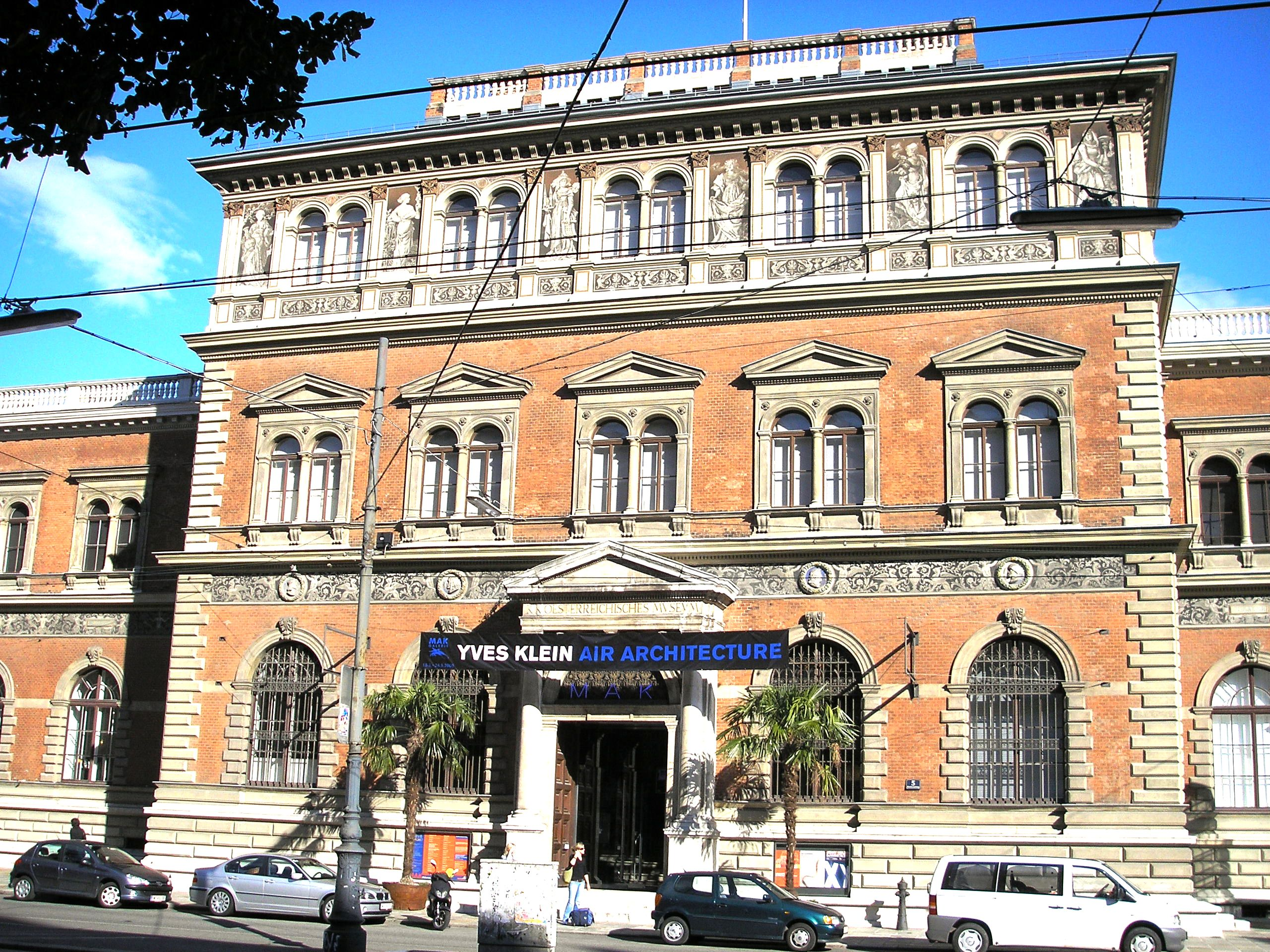 The Österreichisches Museum für angewandte Kunst (Museum of Applied Arts, or MAK) in Vienna.